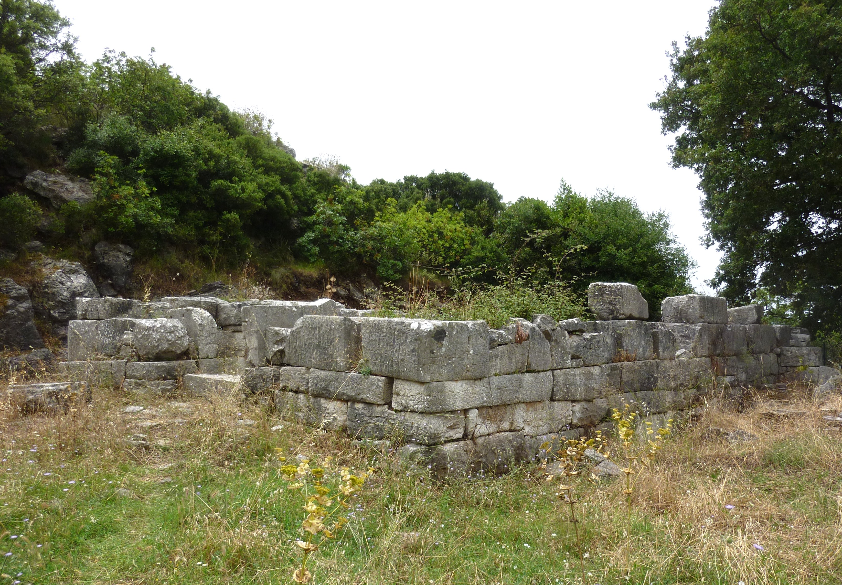 Temple d'Athéna à Phigalie, Grèce